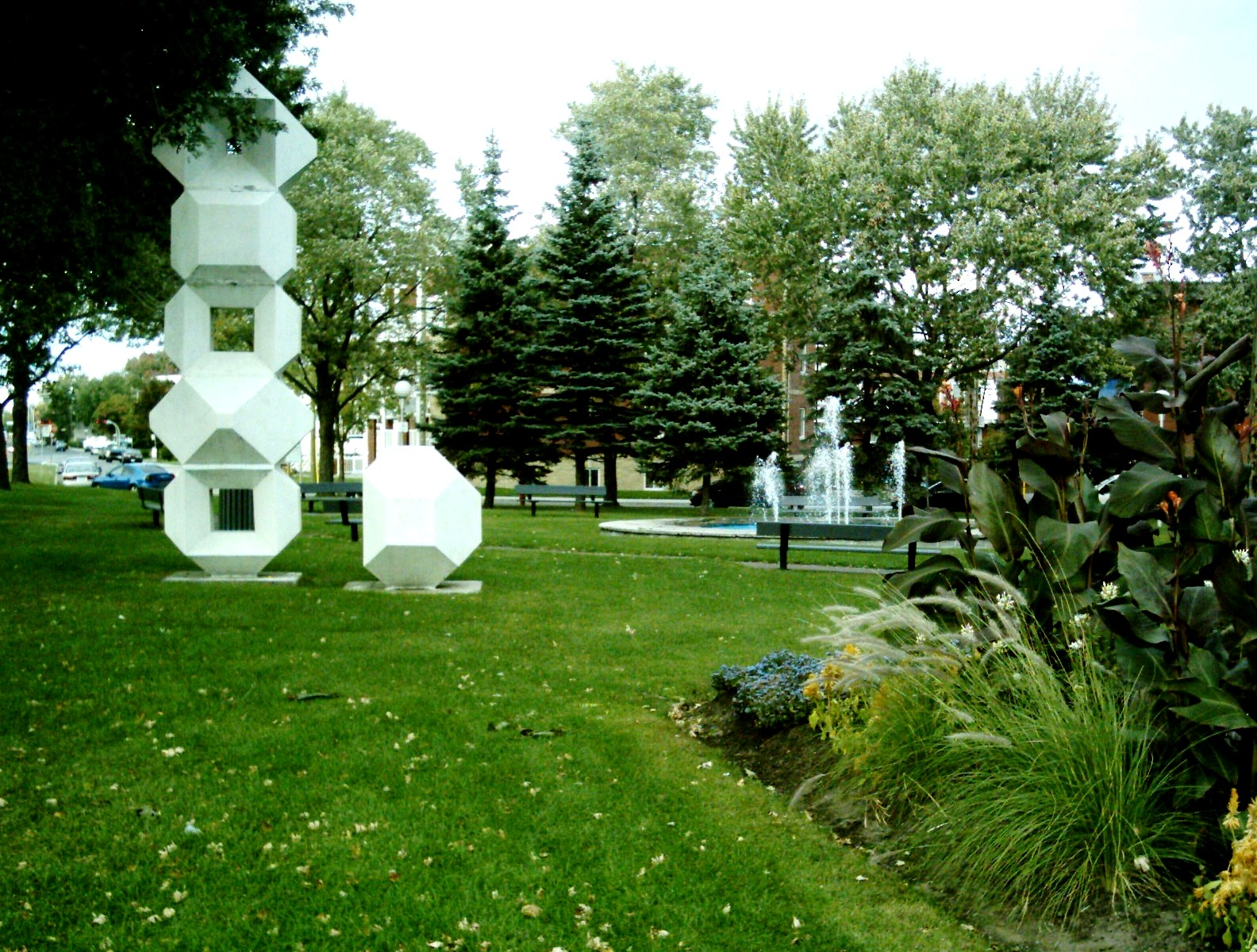 Parc Sauvé à Montréal-Nord, à l'intersection des boulevards Henri-Bourassa et Léger, avec une sculpture de Pierre Granche.